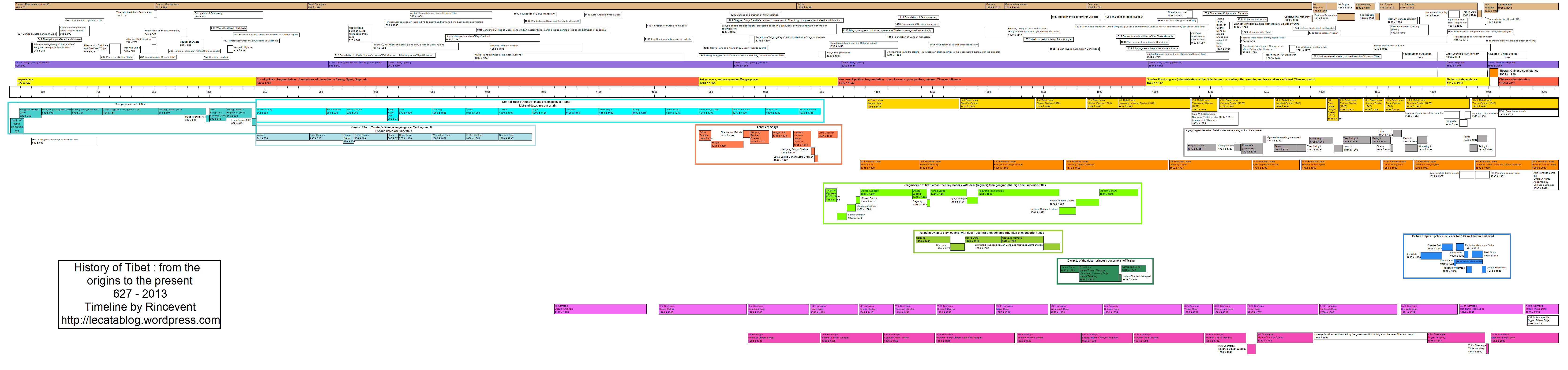 Frise chronologique de l'histoire du Tibet (627 - 2013)